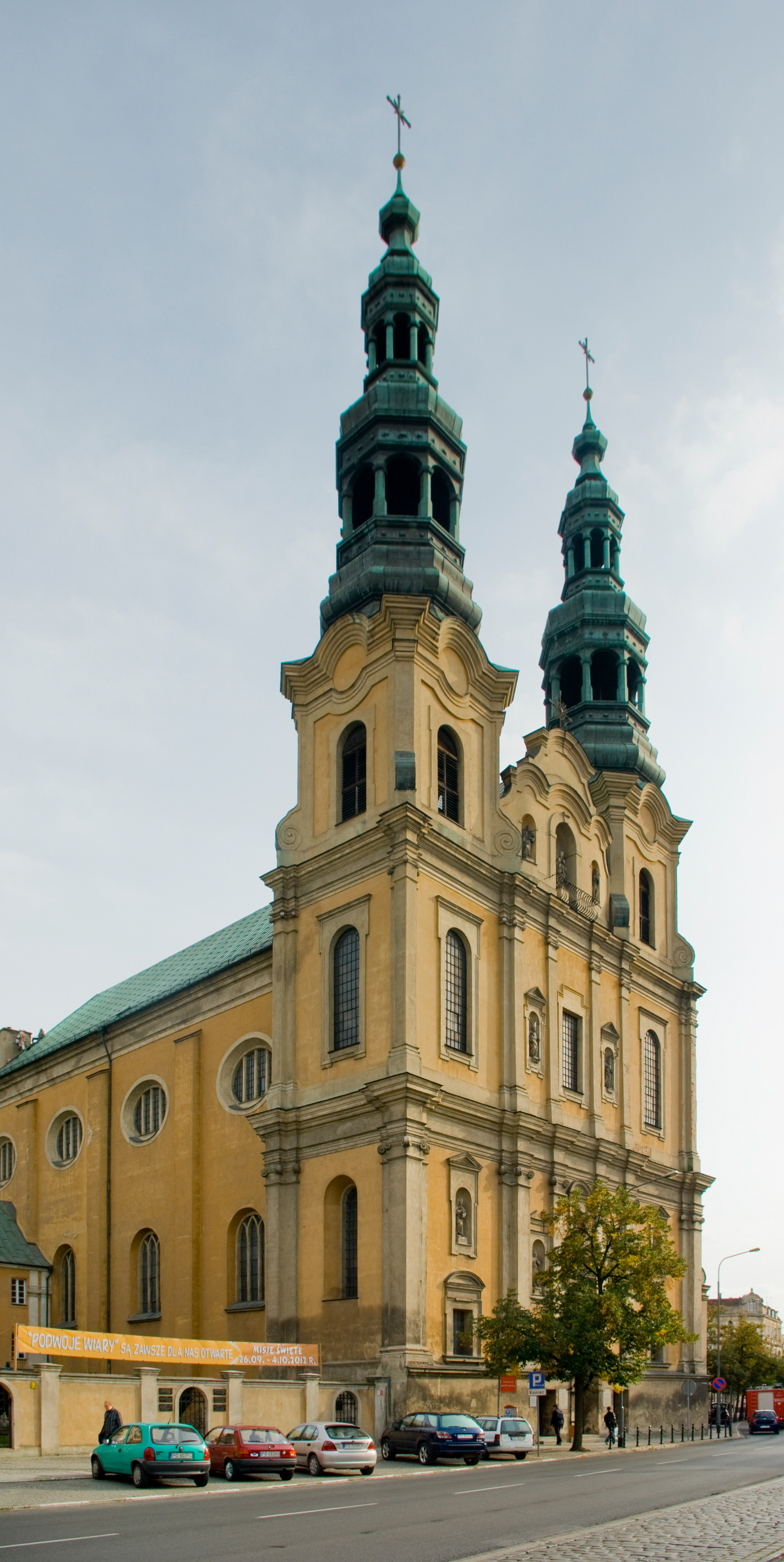 Kościół św. Franciszka Serafickiego w Poznaniu (zabytek nr A-164 from 25.02.1931)